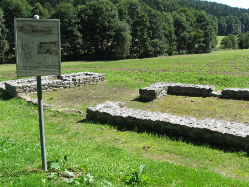 Zaniklá středověká osada Bystřec v Rakoveckém údolí